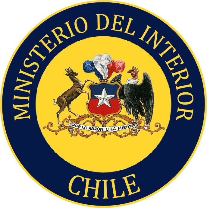 Escudo que saqué de la bandera que está en la oficina del ministro del interior: Pedí, mediante la ley de transparencia, fotos de la bandera las que me fueron entregadas casi de inmediato. Con esas fotos, confeccioné la imagen entre paint y word. Espero sirva.